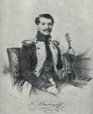 Николай Иванович Бахметев (1807—1891)